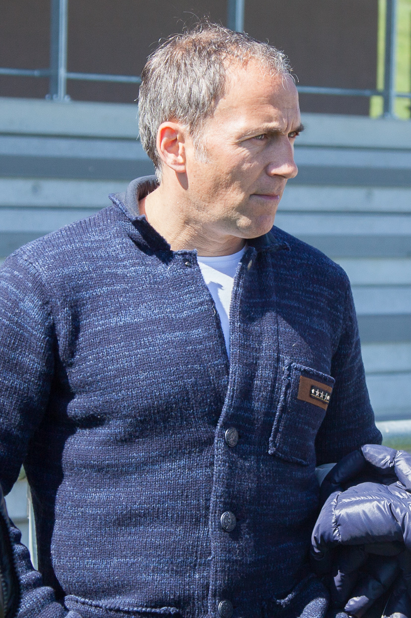 Darko Milanič.